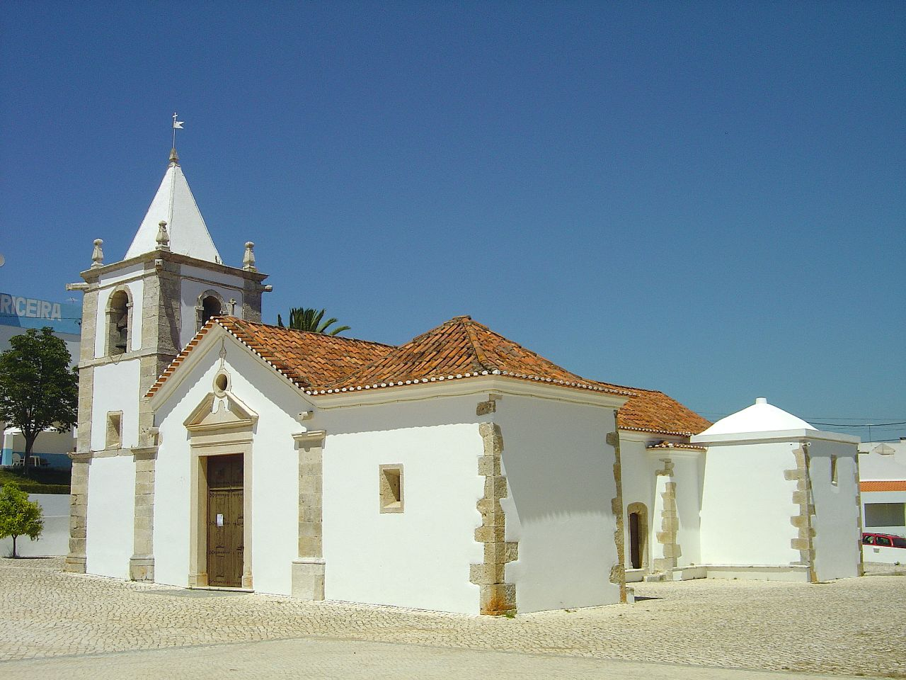 Construída em 1511, a Igreja Matriz da Louriceira é, de todo o seu património, o edifício com maior interesse histórico e arquitectónico. De invocação a Nossa Senhora da Conceição, este templo tem sofrido várias alterações, das quais se salientam as reconstruções de 1560 e de 1942, tendo sido recentemente classificado como imóvel de interesse público. Esta igreja, de estilo manuelino, posteriormente alterado, tem empena de bico ladeado por uma torre baixa de base quadrangular de feição quinhentista, as portas laterais são manuelinas, com as vergas golpeadas; no extra-dorso da capela-mor existem três gárgulas ornamentais. O corpo do templo é revestido por azulejos azuis e brancos do século XVI, que anteriormente o deviam revestir totalmente. No pavimento da capela-mor há uma lápide sepulcral digna de referência com um leão no escudo e no epitáfio semi-apagado, em que se diz serem os jacentes Lopo Dias Fayn, fidalgo da Casa d’El Rei falecido em 20 de Janeiro de 1560 e sua mulher. No fecho da cúpula da torre pode ver-se a data de 1561. A torre tem um sino documentado: BELLAS – R. DOS MASTROS – LISBOA. Da estatuária da igreja merece destaque uma imagem de Santa Luzia, um nicho do altar mor em pedra do século XVI, posteriormente pintado, um S. Vicente em pedra do século XVI, uma Nossa Senhora em pedra do início do século XVII e uma imagem de S. Sebastião, boa escultura de pedra do século XVI. See where this picture was taken. [?]